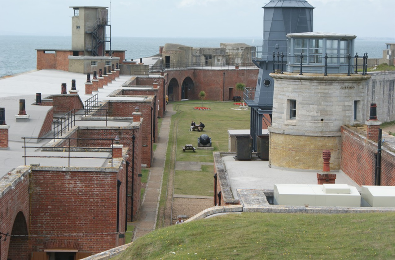 Innenhof mit Munitionsbahn auf Hurst Castle